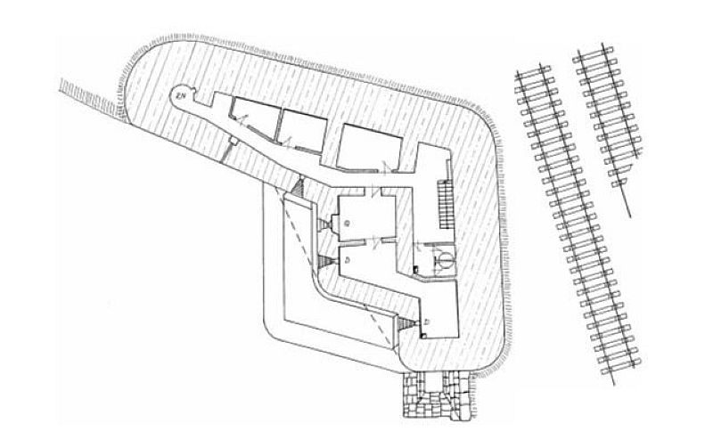 Schemat czechosłowackiego bunkra (zachodnia część) MO S-5 "Na Trati" w Boguminie.